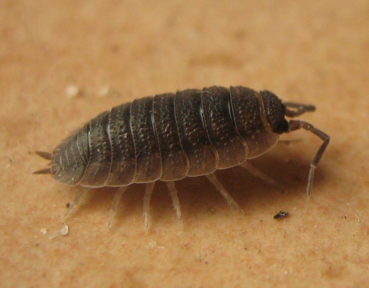 Die Kellerassel Porcellio scaber (Graal Müritz, Landkreis Bad Doberan)